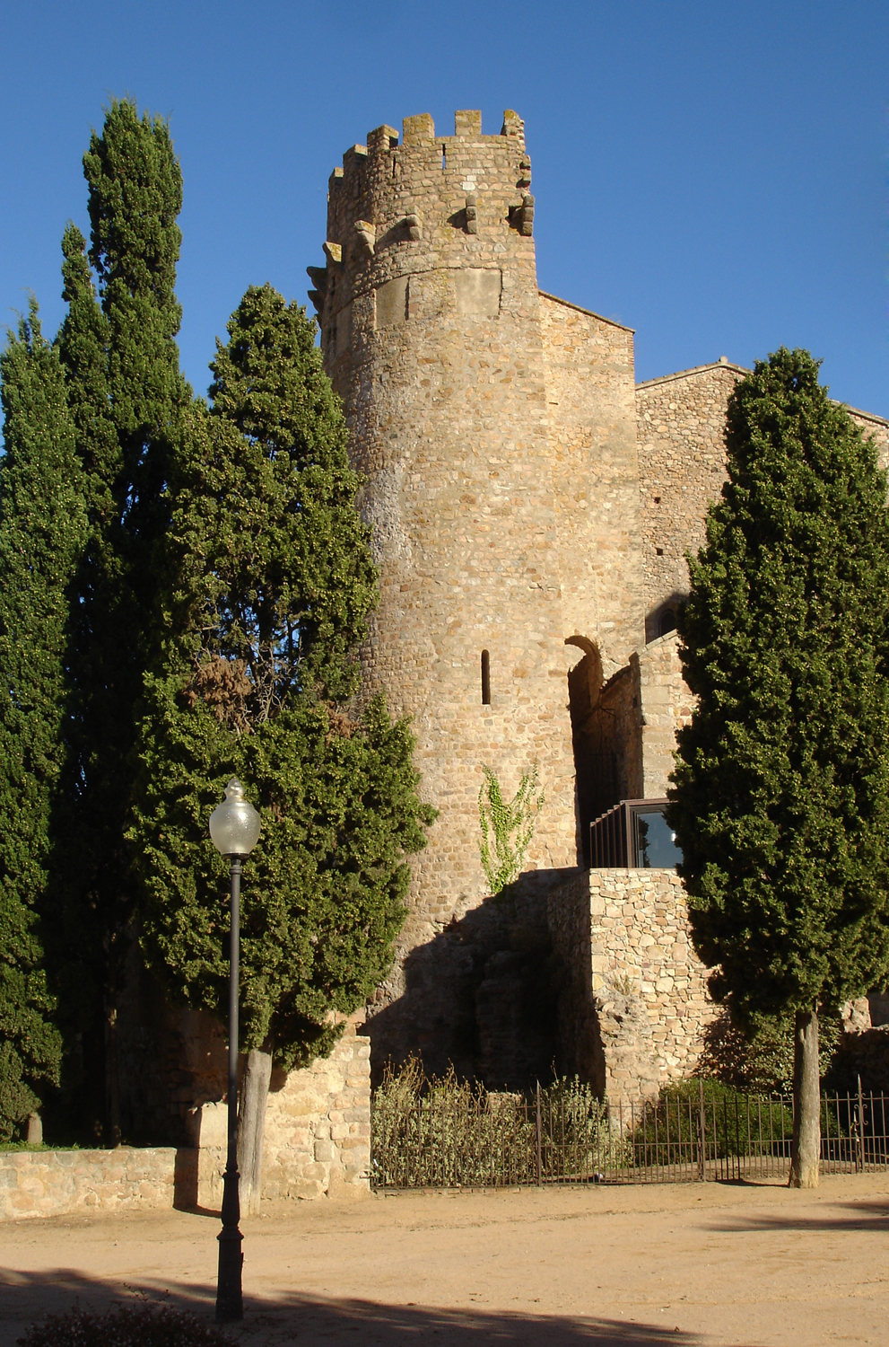 Monestir de Sant Feliu de Guíxols - "Torre de Fum" (Girona, Catalunya, Espanya)